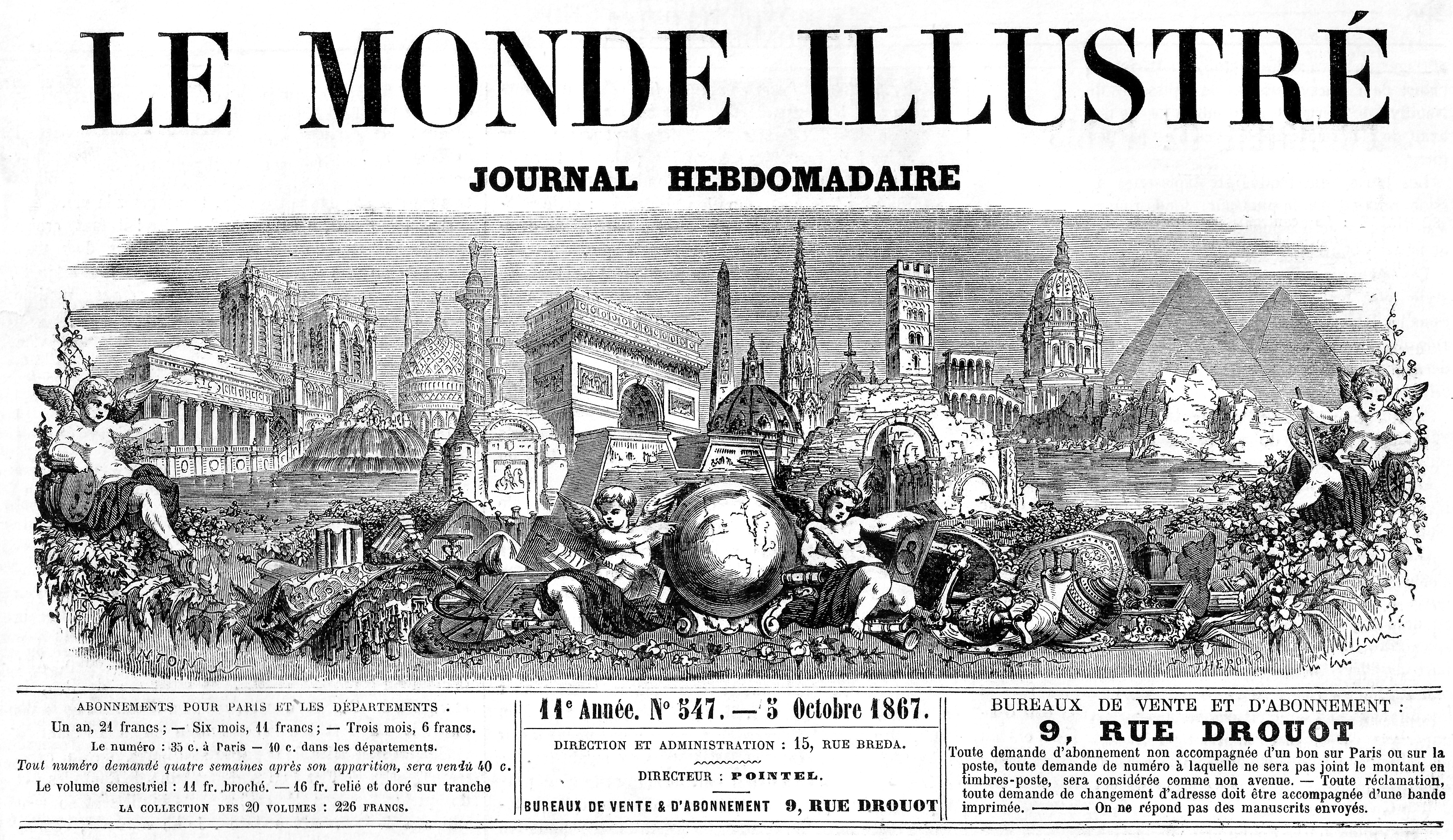 Le Monde illustré (France) — Newspaper title in 1867. Le Monde illustré (France) — Titre (bandeau) du journal en 1867.